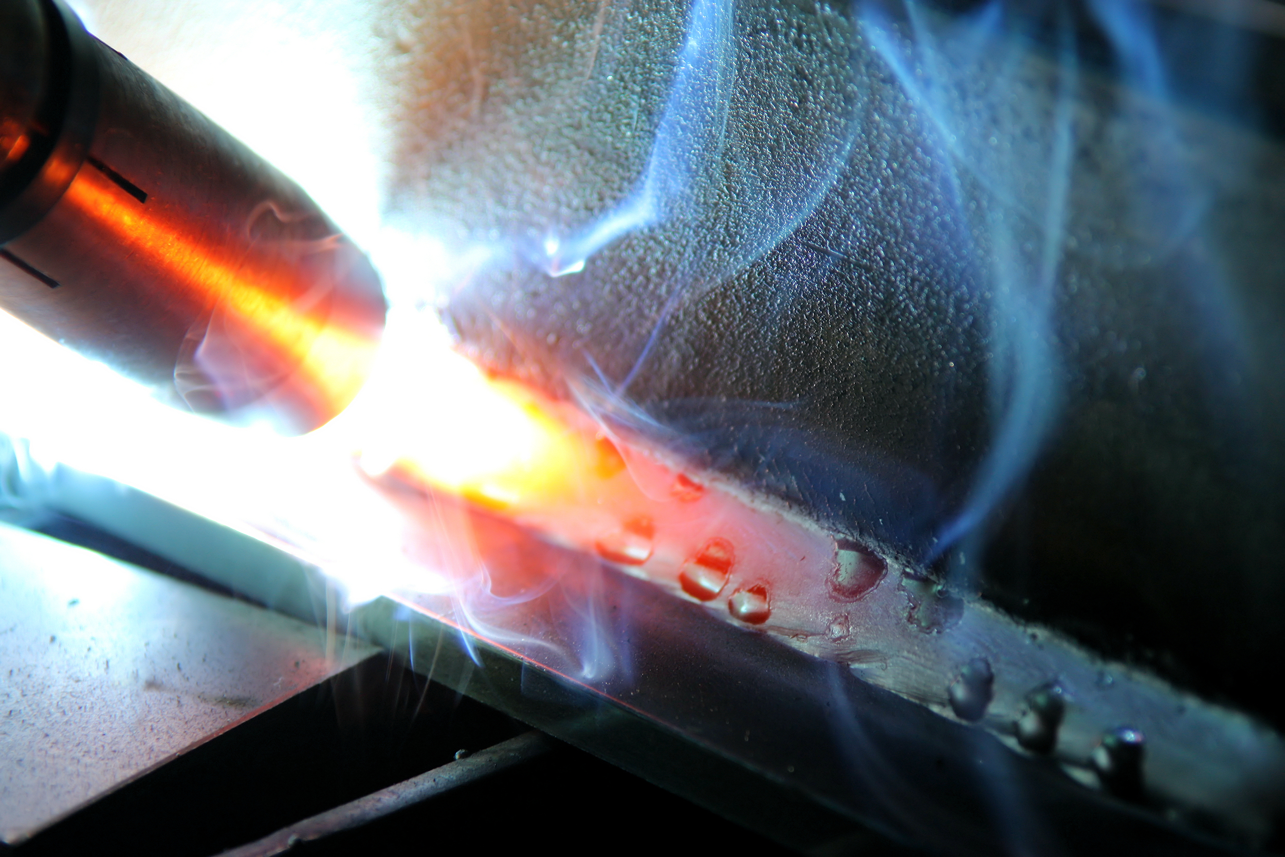 Schweißnaht